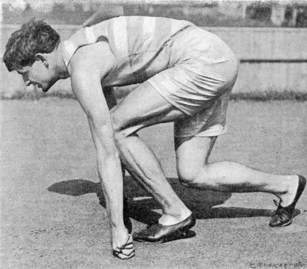 Maxey Long, vainqueur du 400 mètres plat des JO 1900.